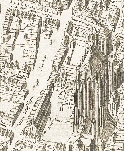 Kupferstich: Mercator-Stadtplan Köln (1571), südliches Domvorfeld